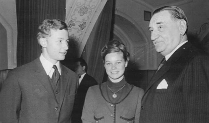 Bruno Marek, Gabriele Seyfert, Wolfgang Schwarz Zentralbild Votavafoto-Tele 14.3.1966 Wien: Eiskunstlauf-Weltelite traf sich in Wien Anläßlich eines großen Schaulaufens gab der Wiener Bürgermeister Bruno Marek am 14.3.1966 für die weltbesten Teilnehmer einen Empfang. vlnr: Bürgermeister Bruno Marek, Vize-Weltmeisterin im der Damen Gabriele Seyfert (DDR) und Vize-Weltmeister der Herren Wolfgang Schwarz (Österreich). -Erstrecht- Abgebildete Personen: Seyfert, Gabriele: Eiskunstläuferin, Olympiade 1964 und 1968, DDR Schwarz, Wolfgang: Eiskunstläufer, Olympiasieger 1968, Österreich Marek, Bruno: Bürgermeister von Wien, Österreich